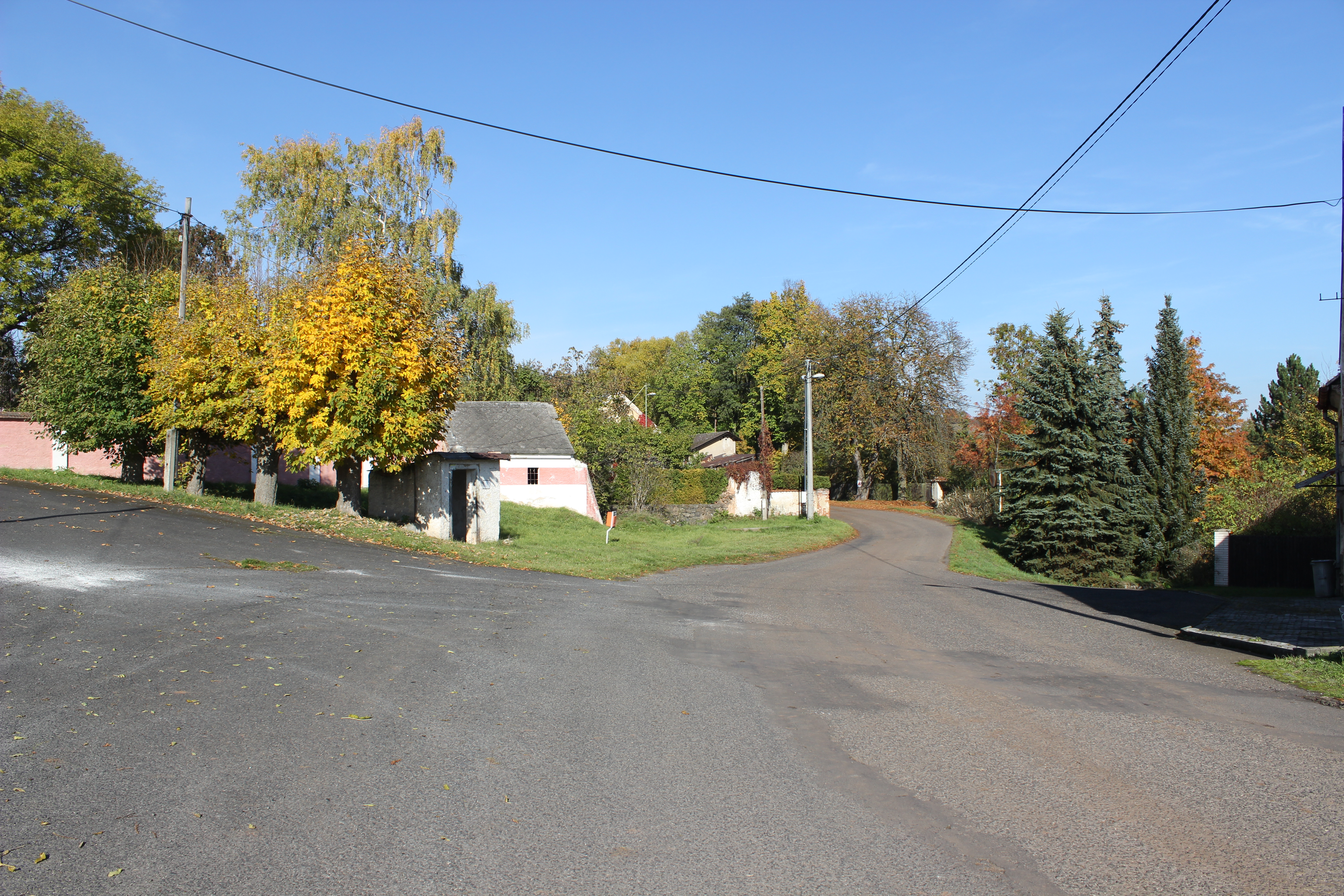 Náves v Kostrčanech.